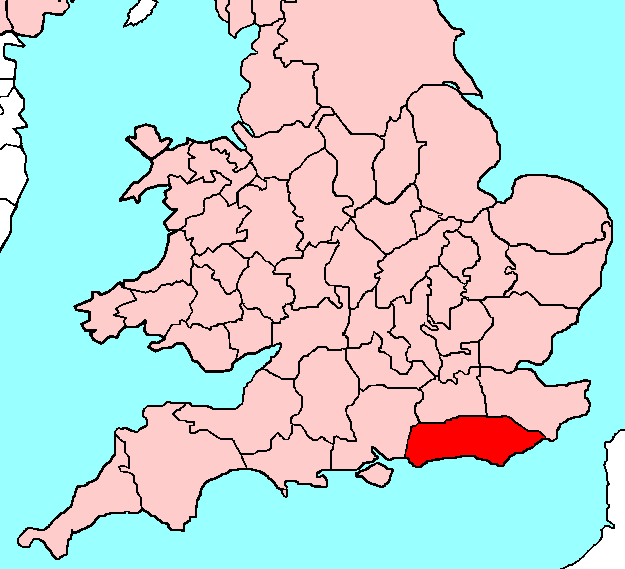 Sussex